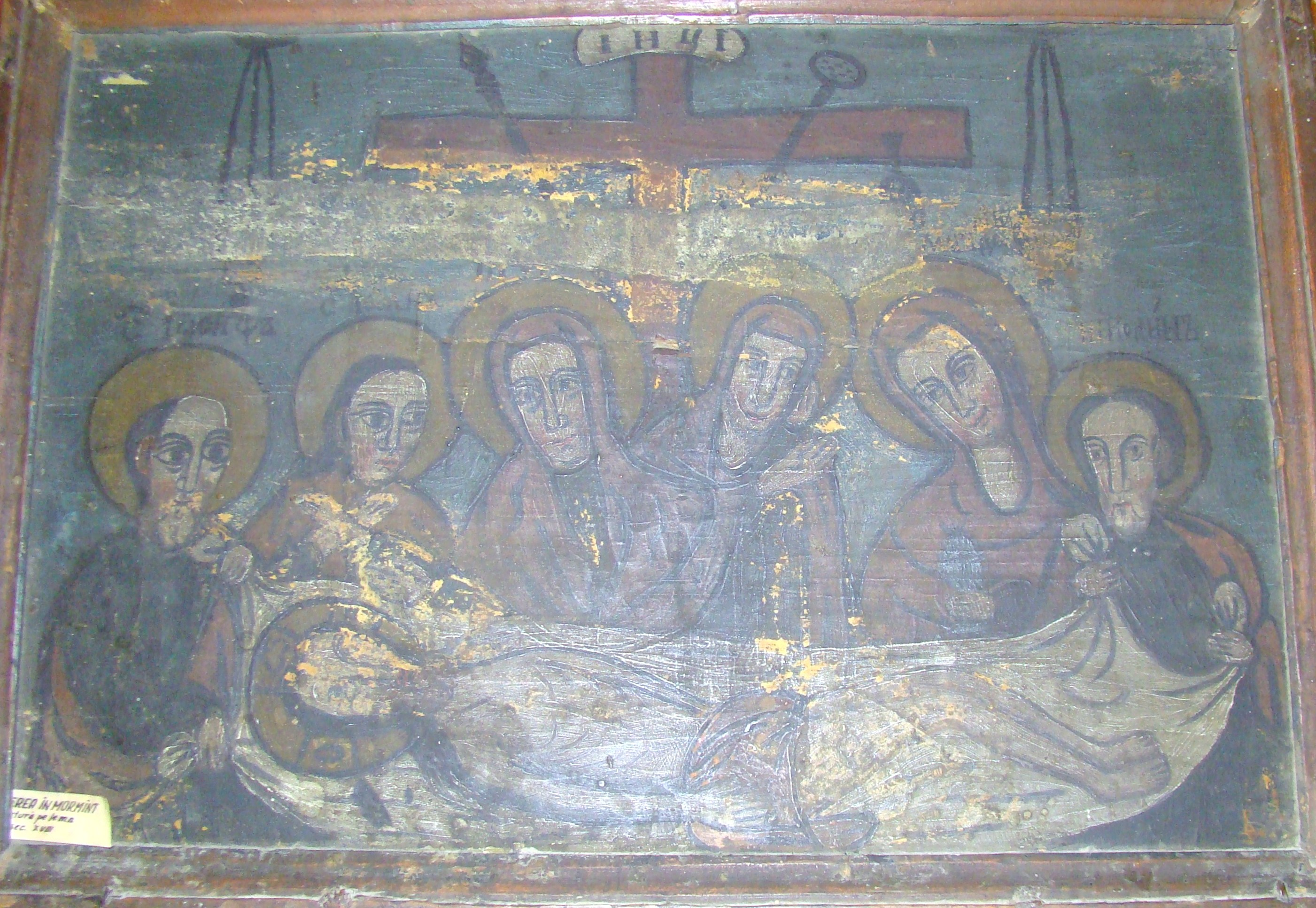 Biserica de lemn din Tinca, județul Bihor